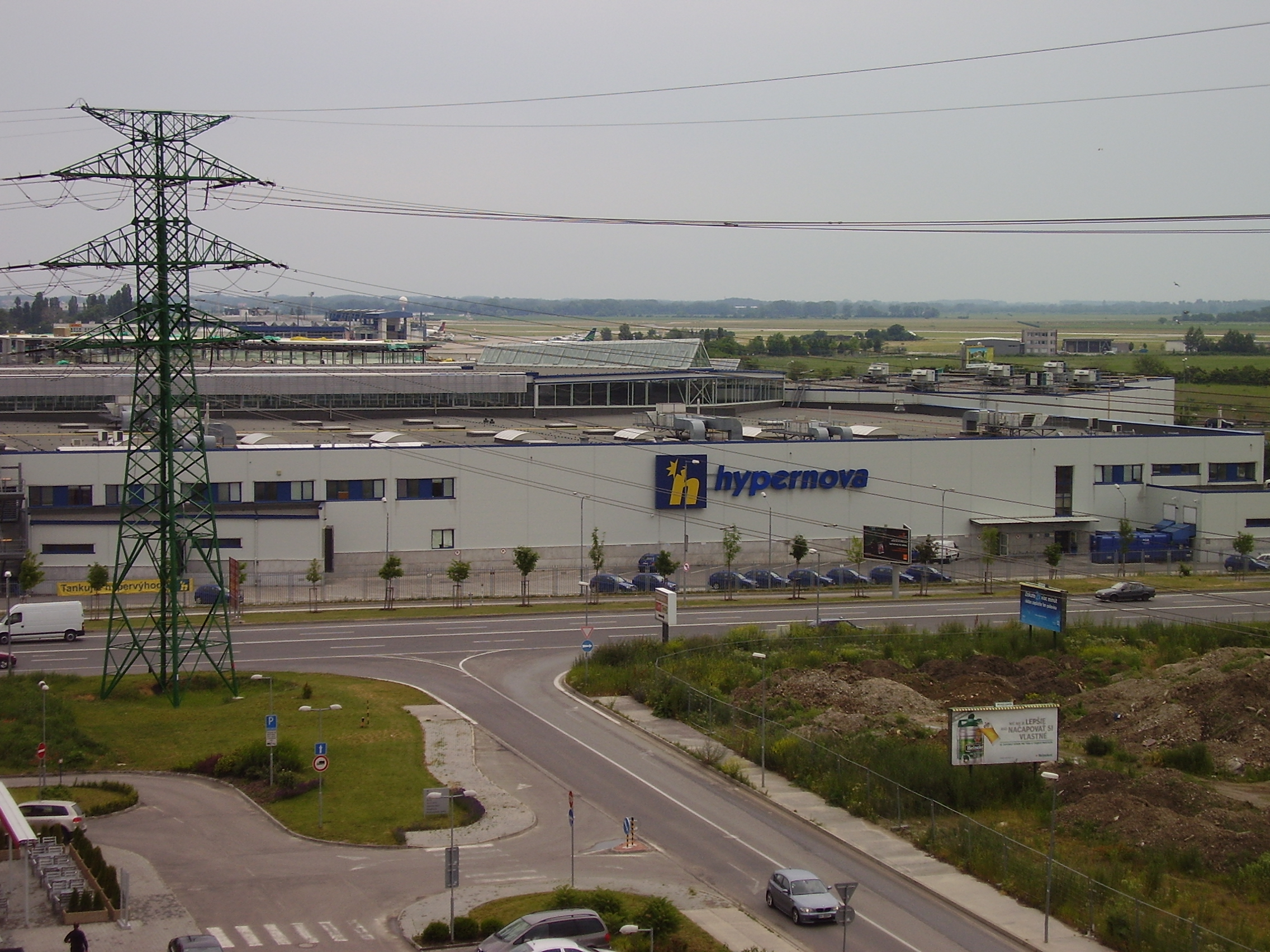 Avion Shoppin Park Bratislava, Slovakia, Hypernova zblízka